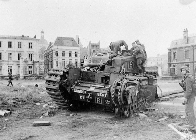 Des soldats allemands examinant un char d'assaut "Churchill du Régiment de Calgary abandonné durant le raid sur Dieppe